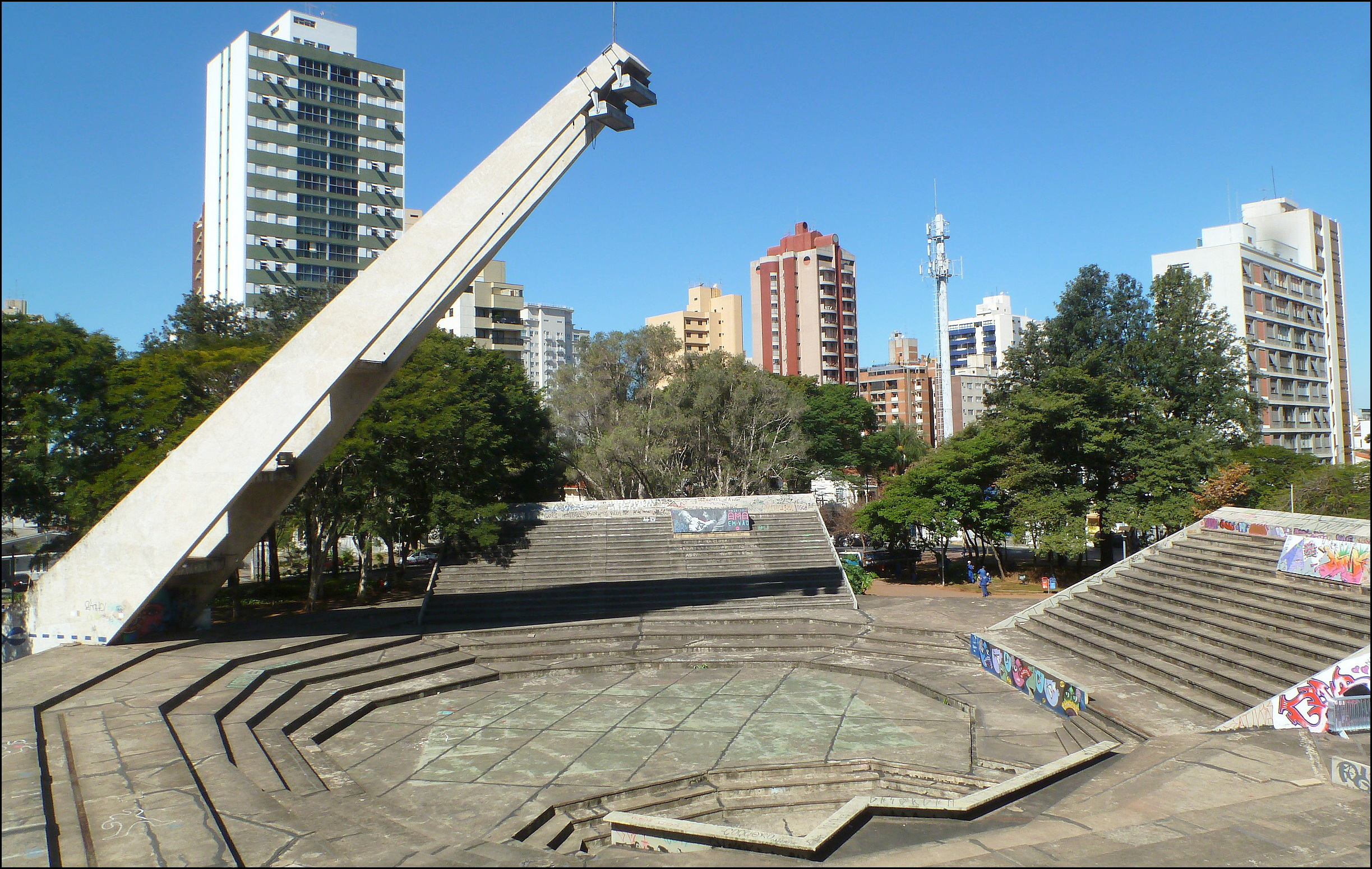 Teatro de Arena